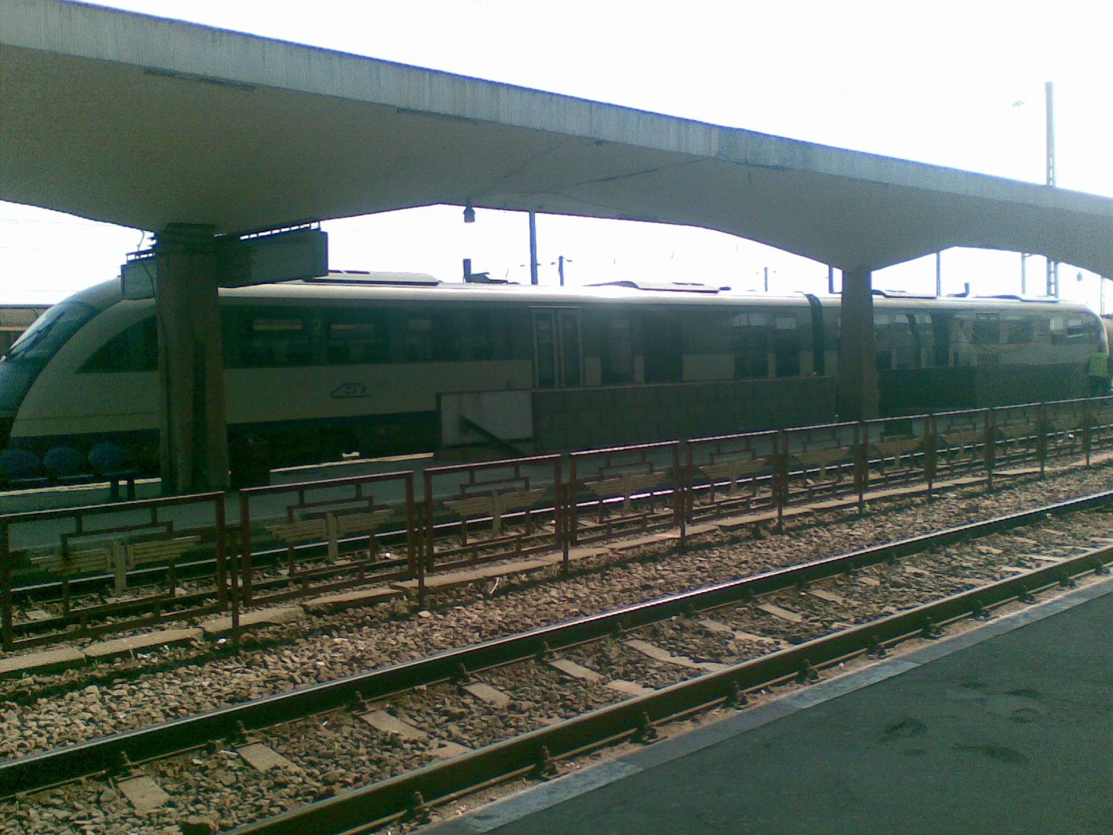 Železniční nádraží v Craiově, Rumunsko